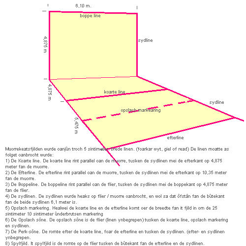 Muorrekeatsen courtfield